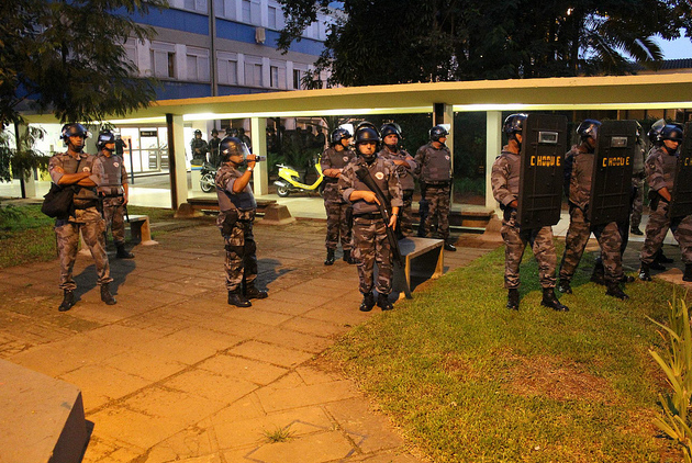 Policiais Militares cercam CRUSP durante operação de reintegração de posse na Universidade de São Paulo em 2011.